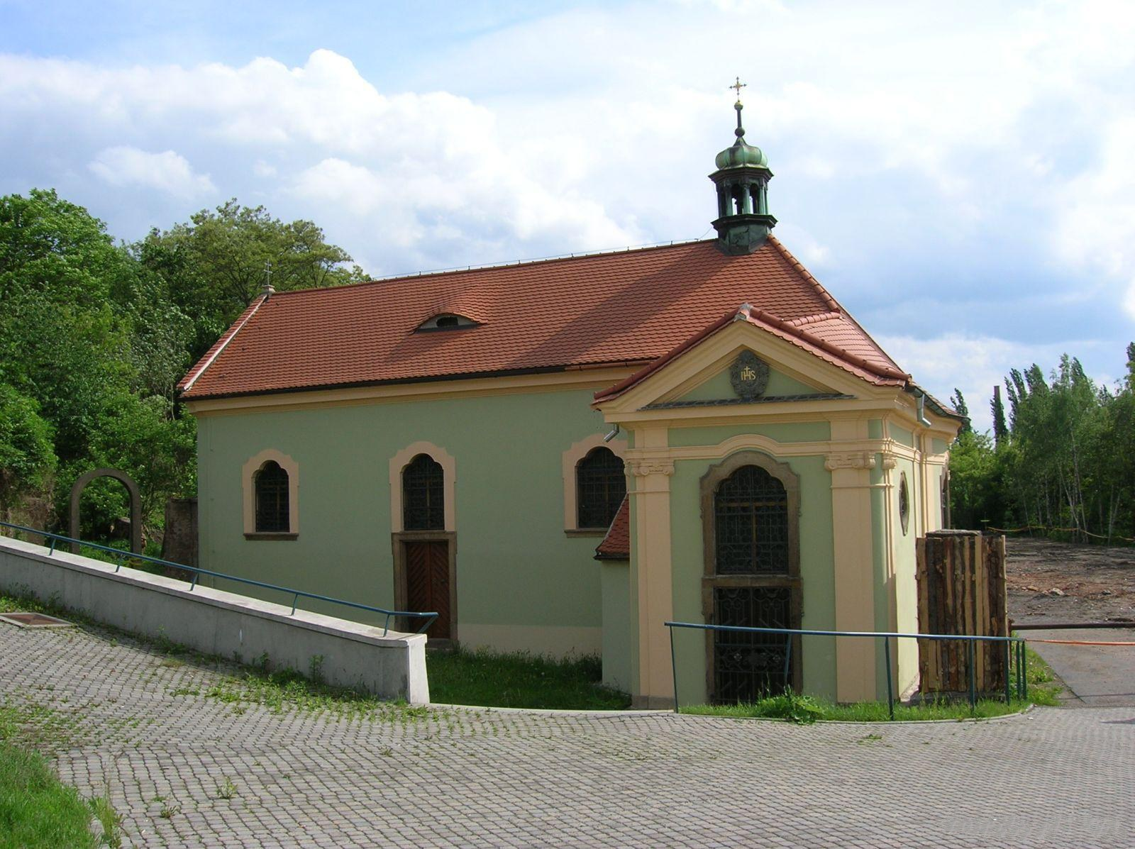 Kostelík U Ježíška v Plzni